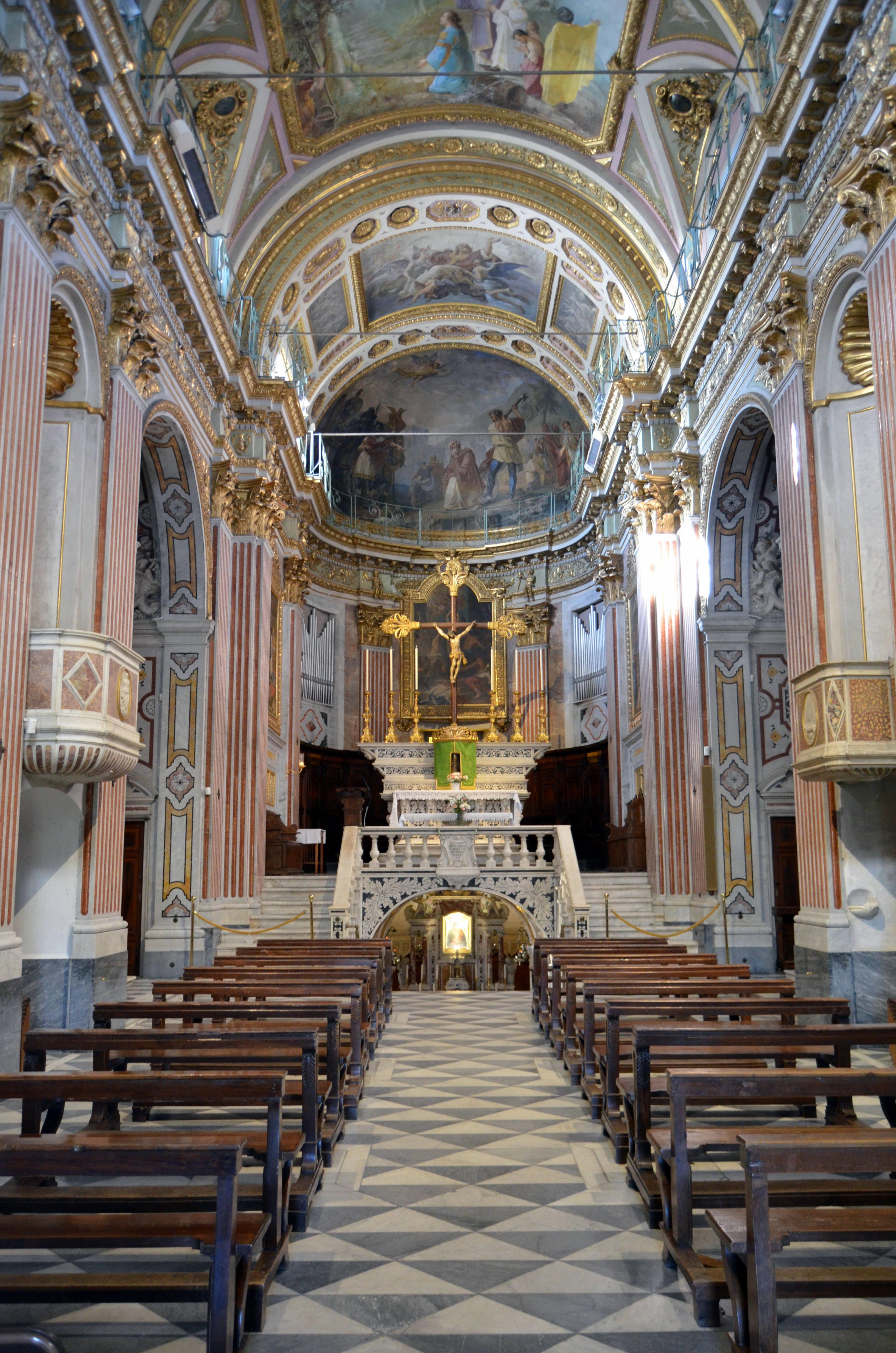 Santuario della Madonna dell'Olivo, Chiavari, Liguria, Italia